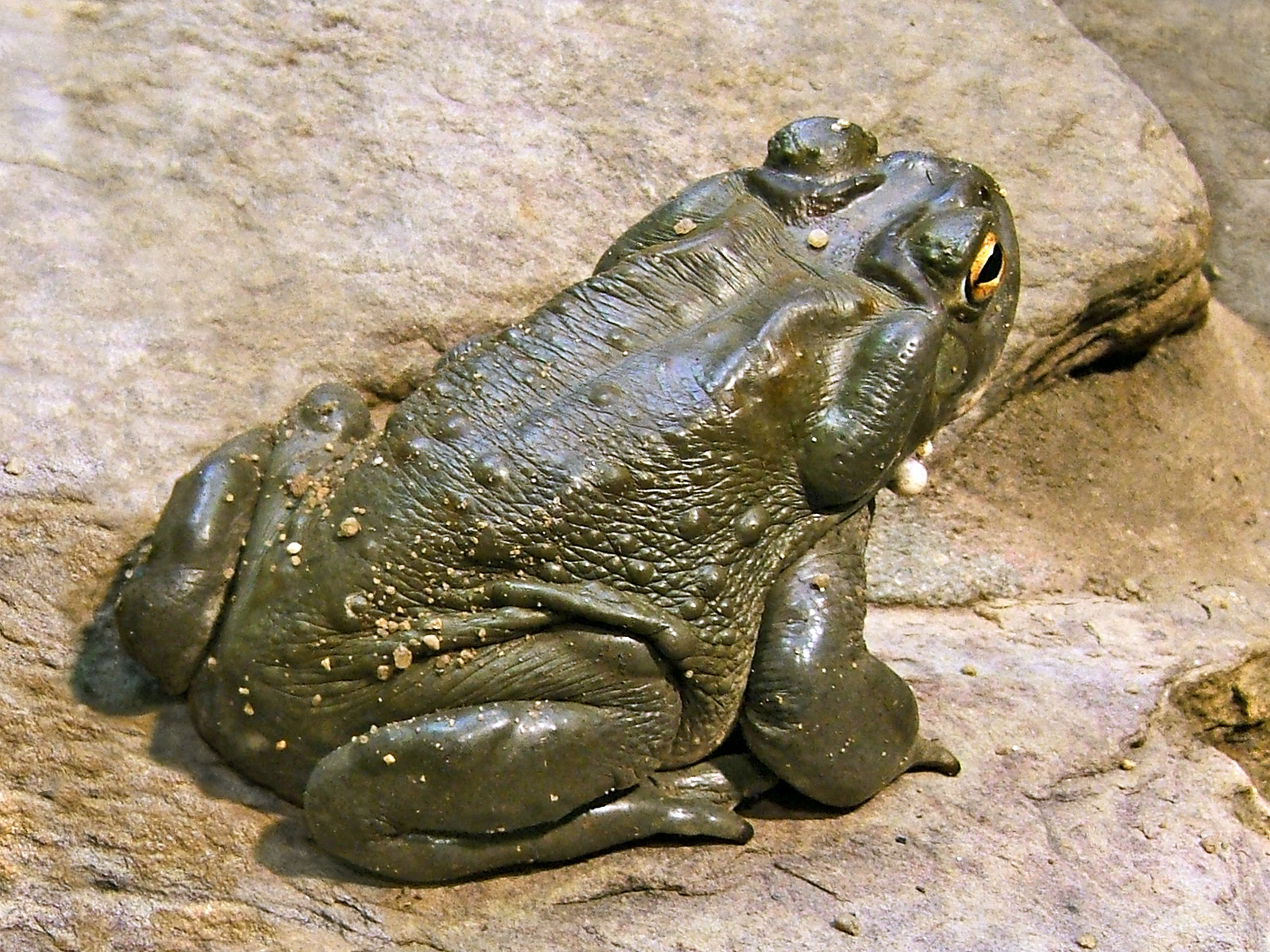 Bufo alvarius